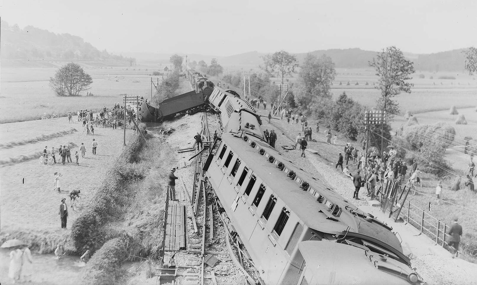 Zugunglück bei Ummendorf, Landesarchiv Baden-Württemberg, Findbuch N 1-68 Nr. 1597